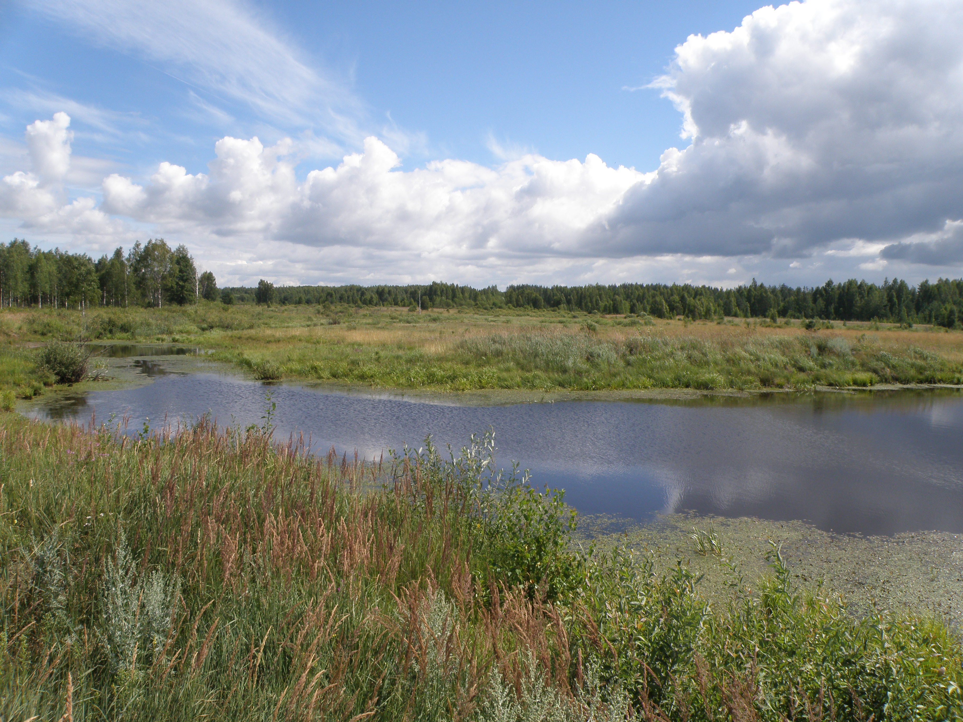 вид до